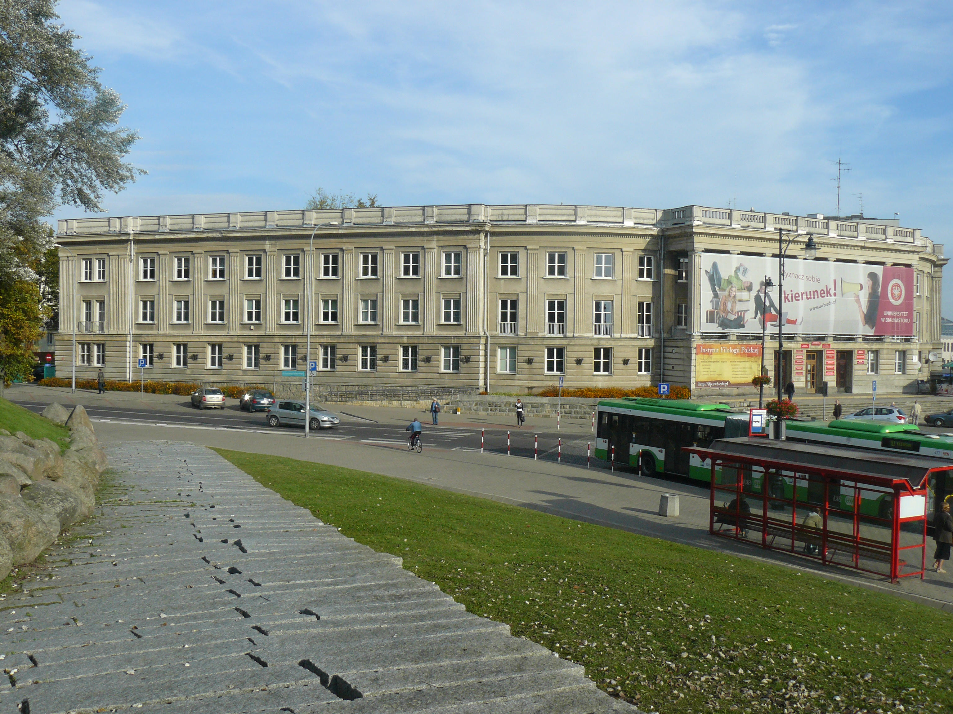 Białystok, Plac Uniwersytecki - dawny Dom Partii, obecnie wydział historii i nauk politycznych UwB (zabytek nr A-229 z 9.09.1993)